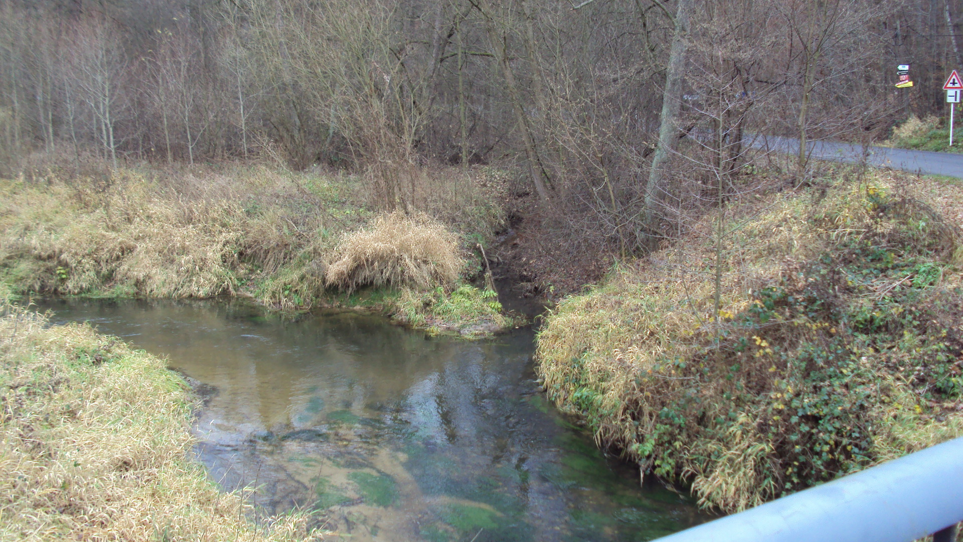 Soutok Svitávky a Kamenického potoka mezi Zákupy a obcí Kamenice